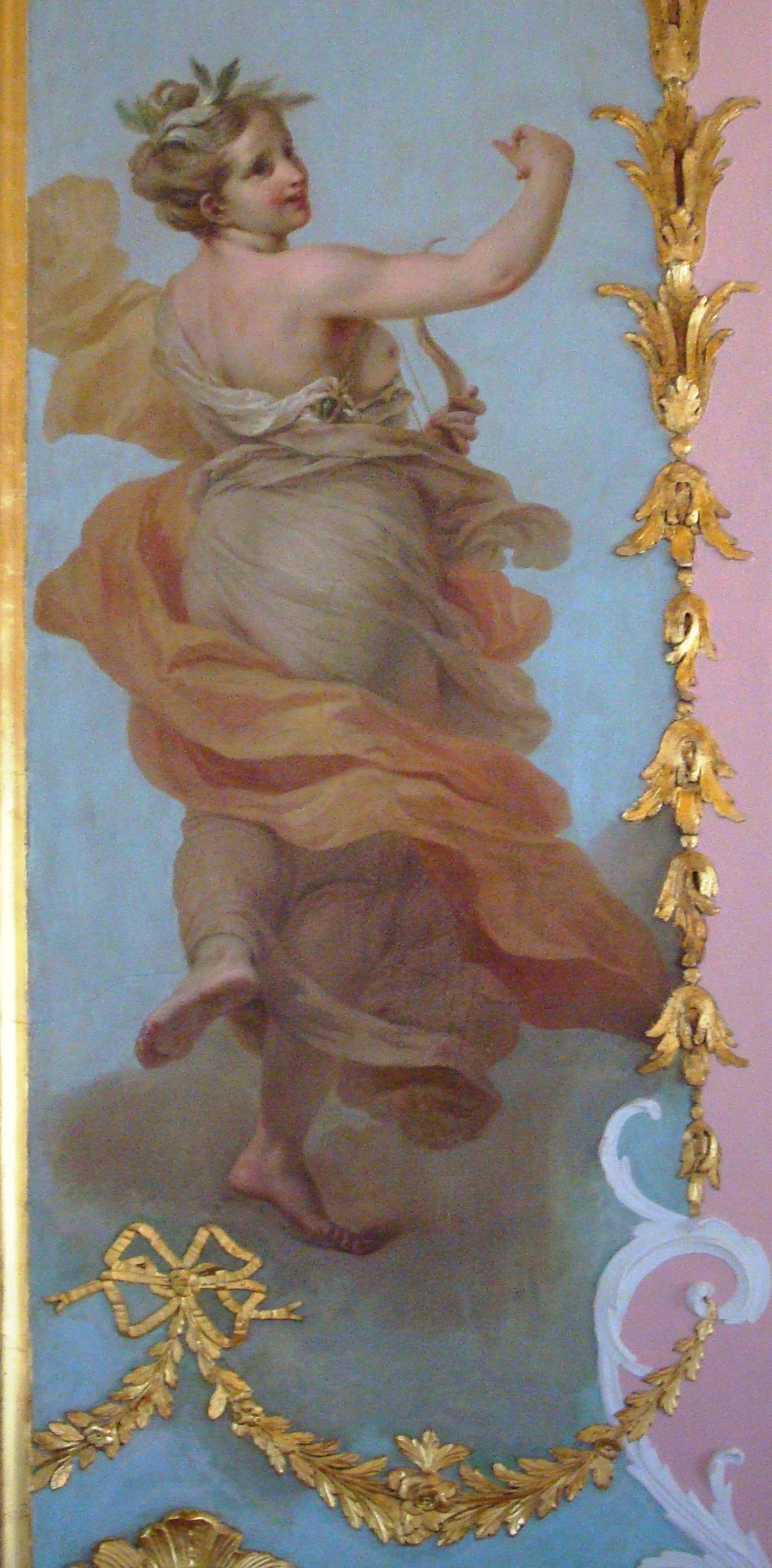 Ораниенбаум. Китайский дворец. Зал муз. Восточная стена. Муза танца Терпсихора